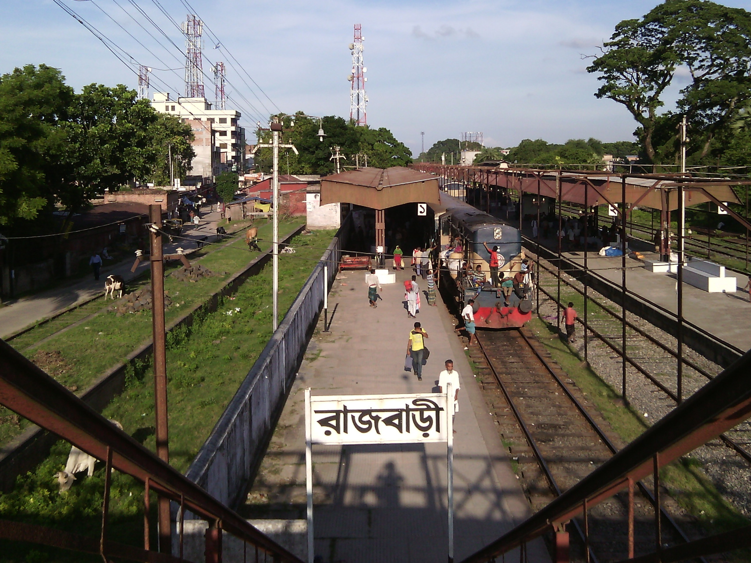 রাজবাড়ী রেলস্টেশোন ওভার ব্রিজ হতে তোলা এক ছবি ফটোগ্রাফঃ Tanmoy Datta